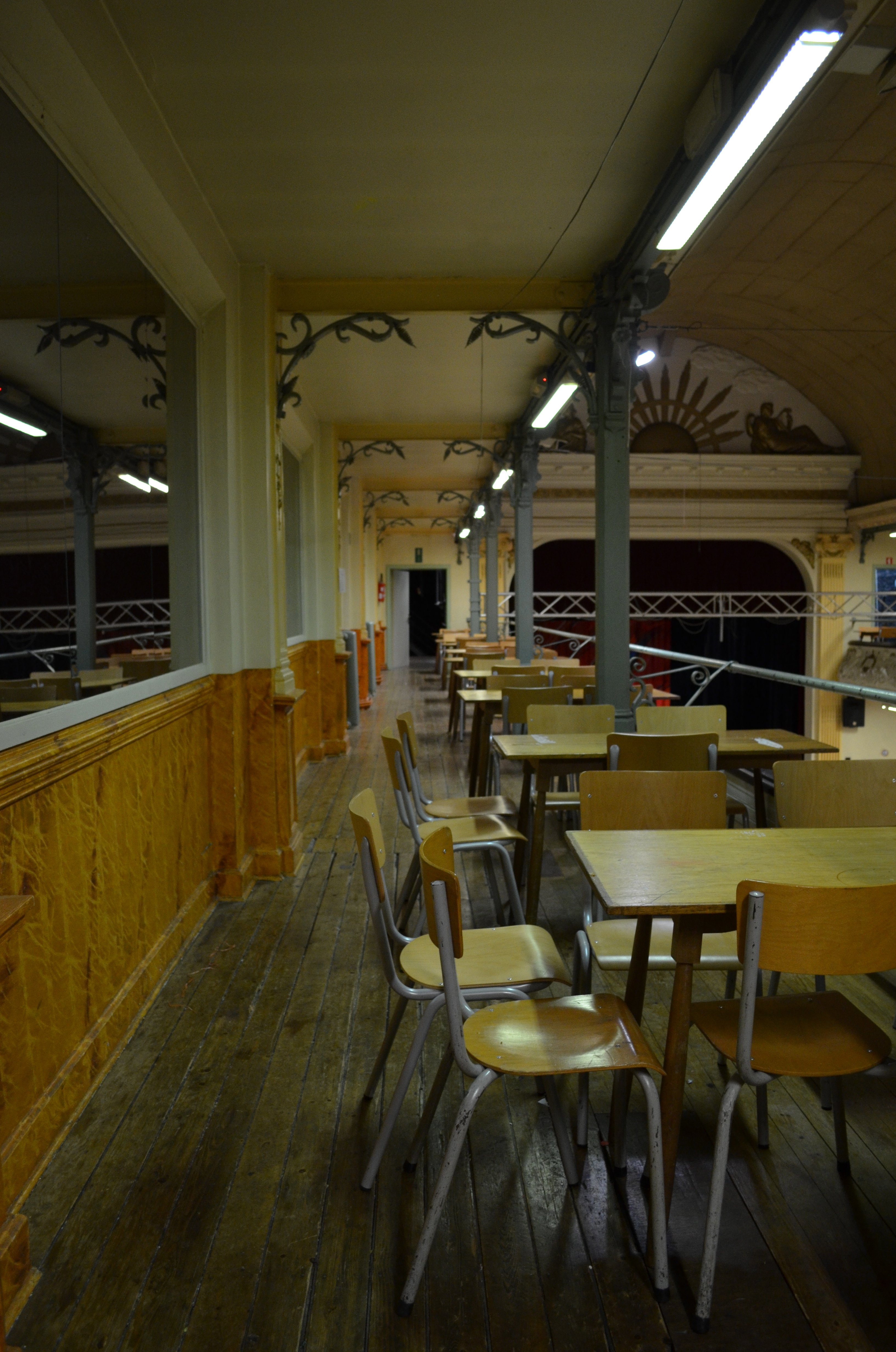 Lodelinsart (Charleroi-Belgique) - Salle de la Ruche verrière